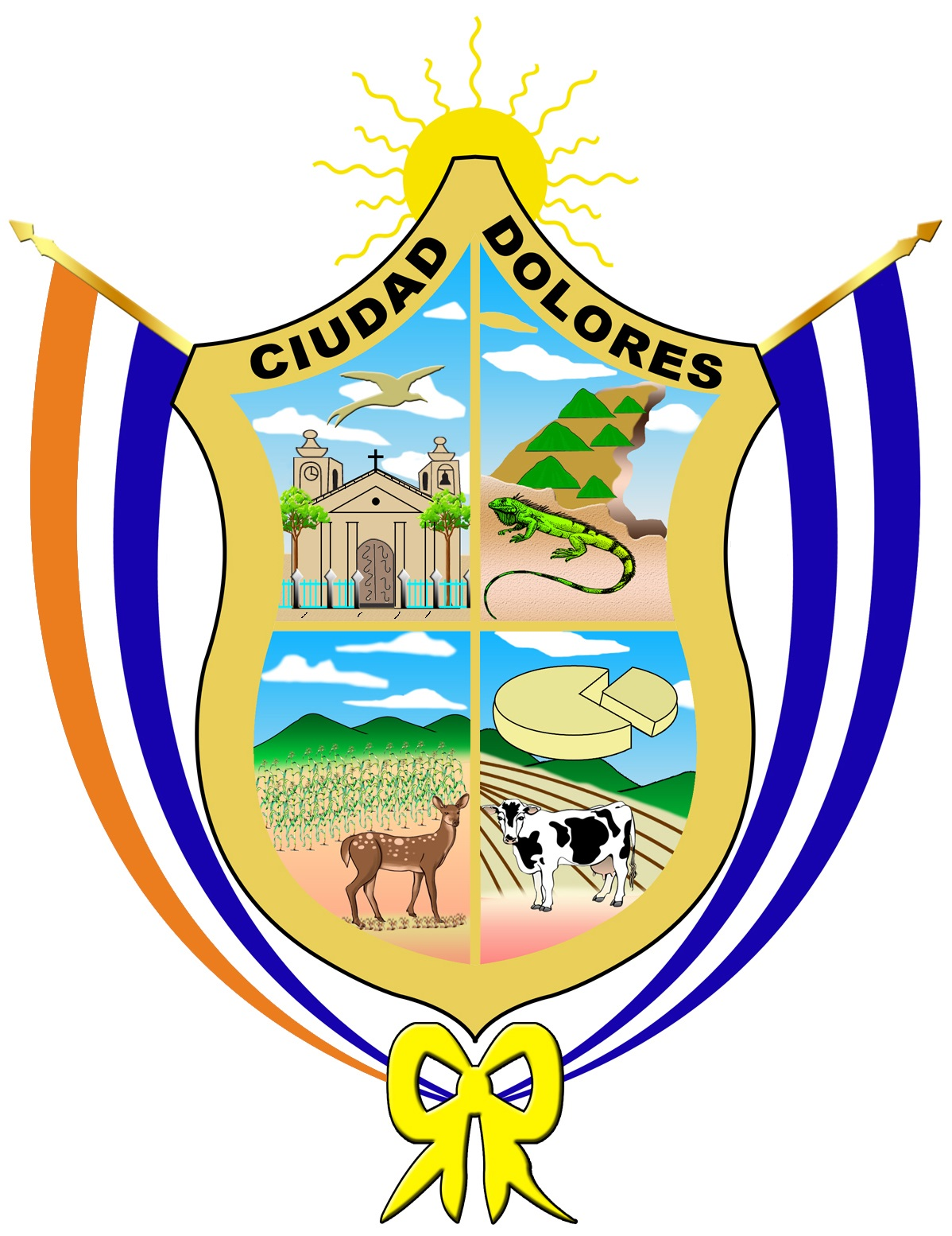 Iglesia simbolo de religiosidad del Pueblo, Cerros, Lo que rodea a la ciudad Venado y Vaca algo titpico del Municipio y a lo cual la mayoria se dedica a producir lacteas Puebla.